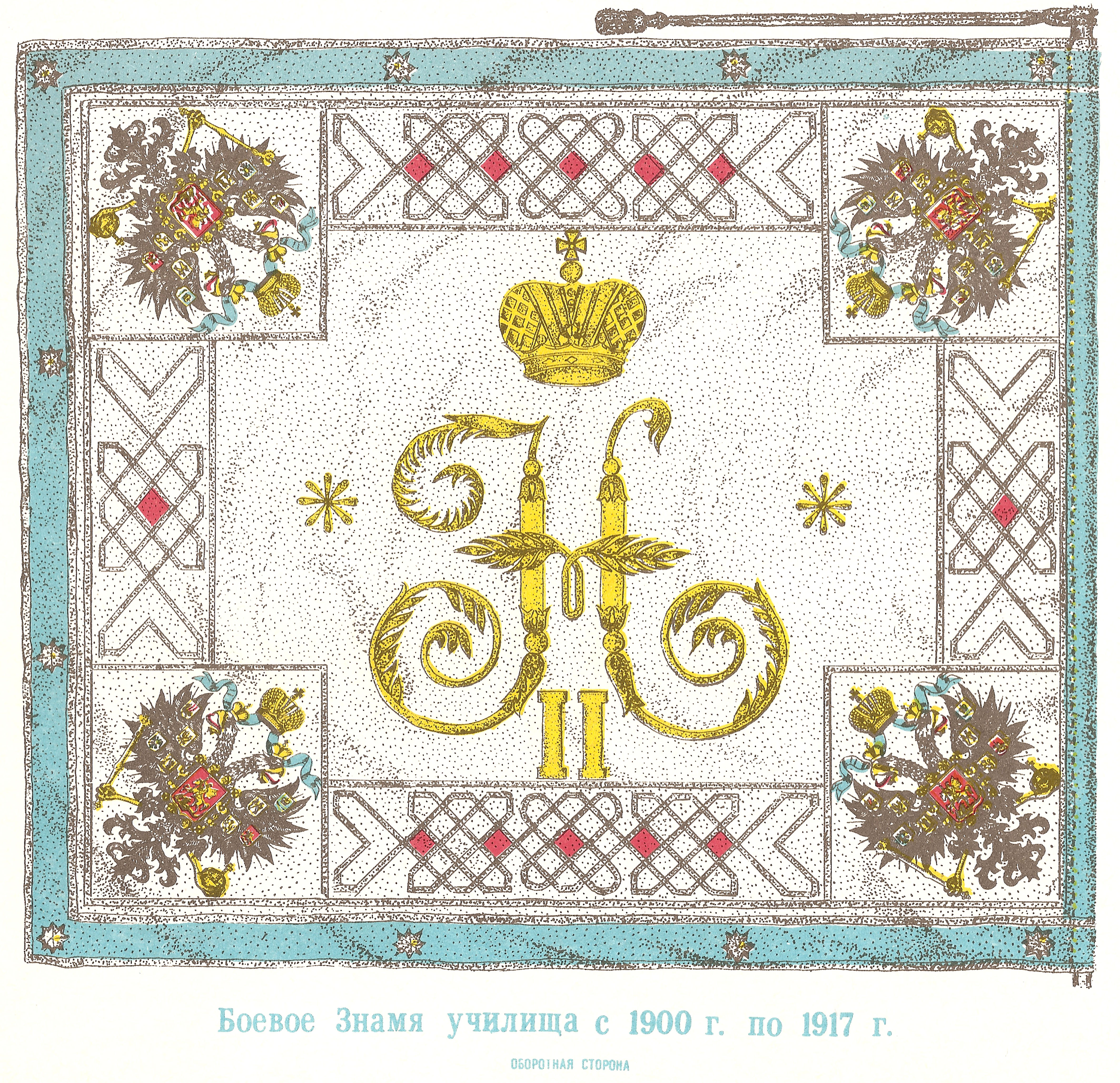 Изображение боевого знамени военно-топографического училища 1900 года. (оборотная сторона)